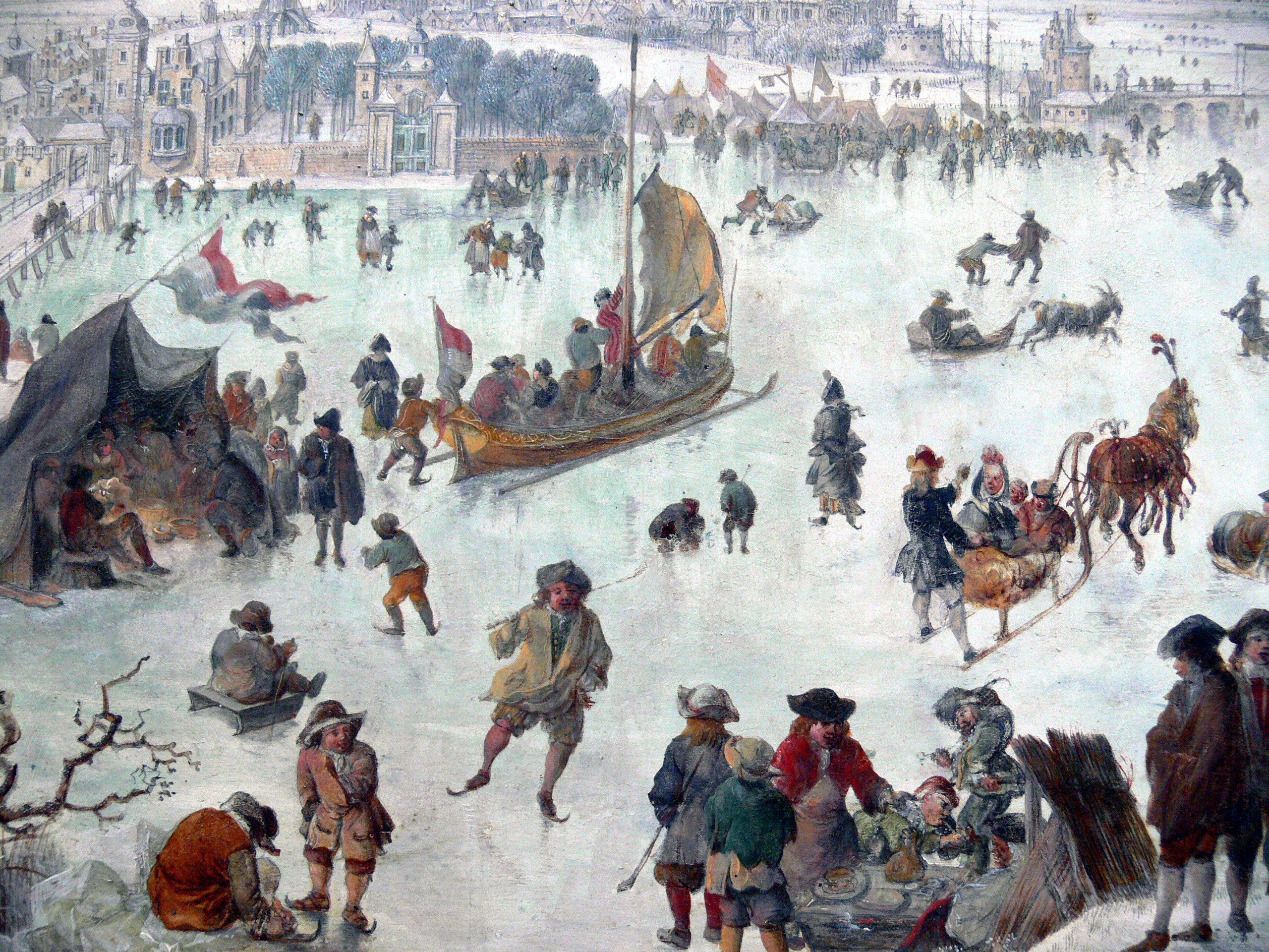 Plaisir d'hiver (detail)